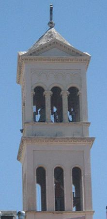 Campanile della Chiesa del Redentore, Ruvo di Puglia